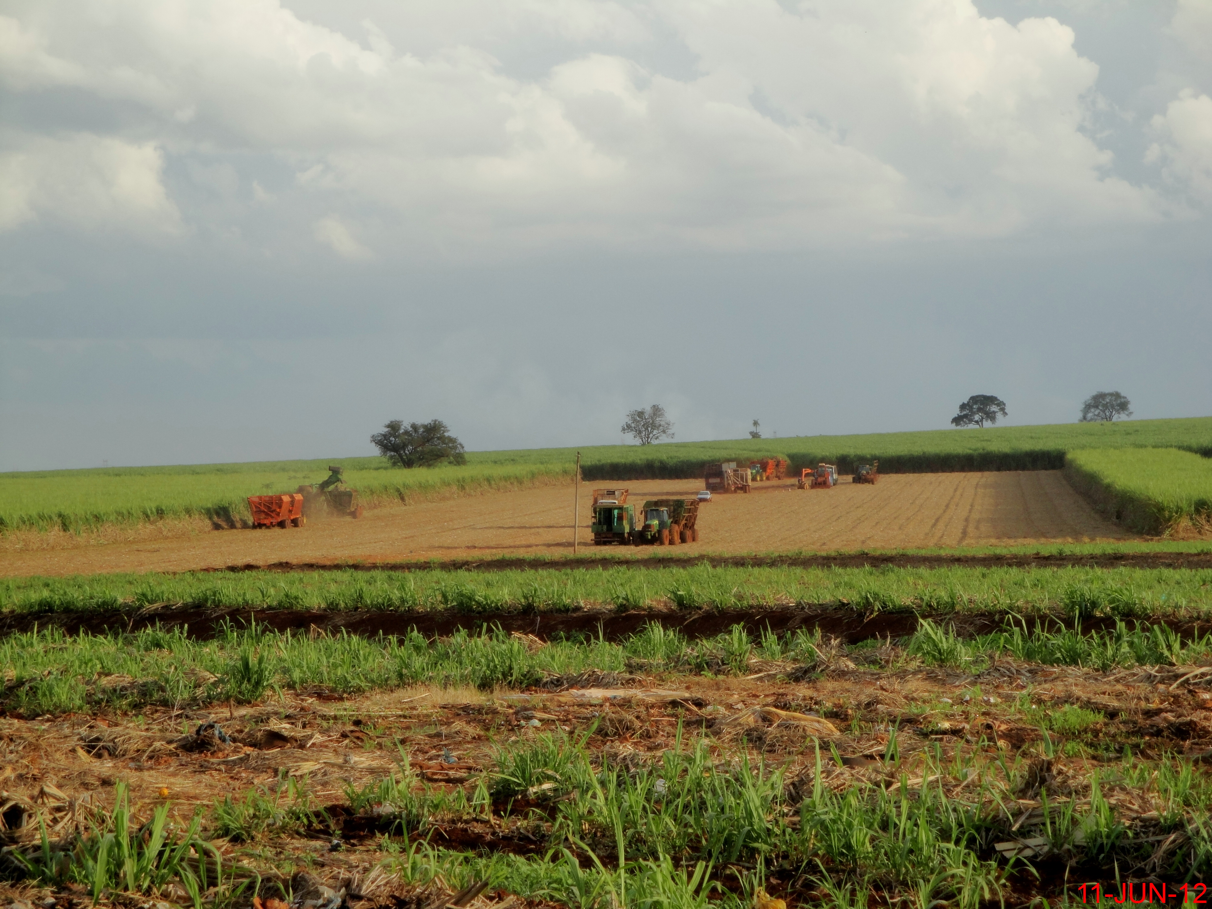 Colheita mecanizada da cana de açúcar - Mechanized harvesting of sugarcane - Rodovia vicinal Pontal/Cândia/Sales Oliveira